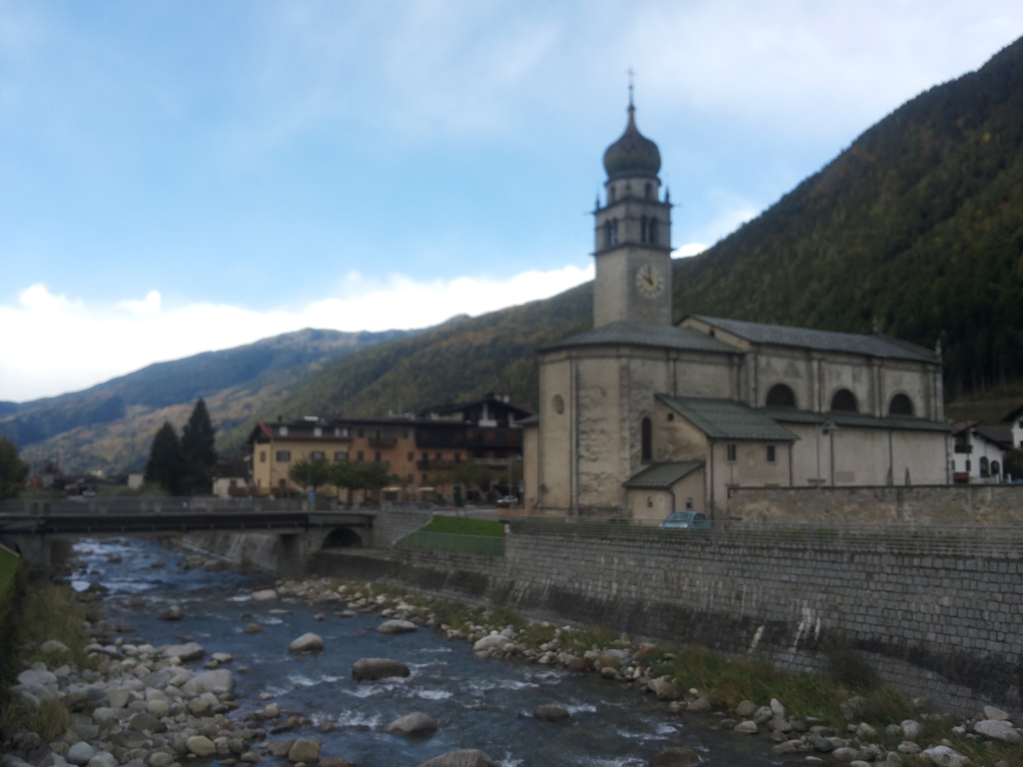 Spiazzo in Val Rendena (provincia di Trento). Fiume Sarca e chiesa di San Vigilio